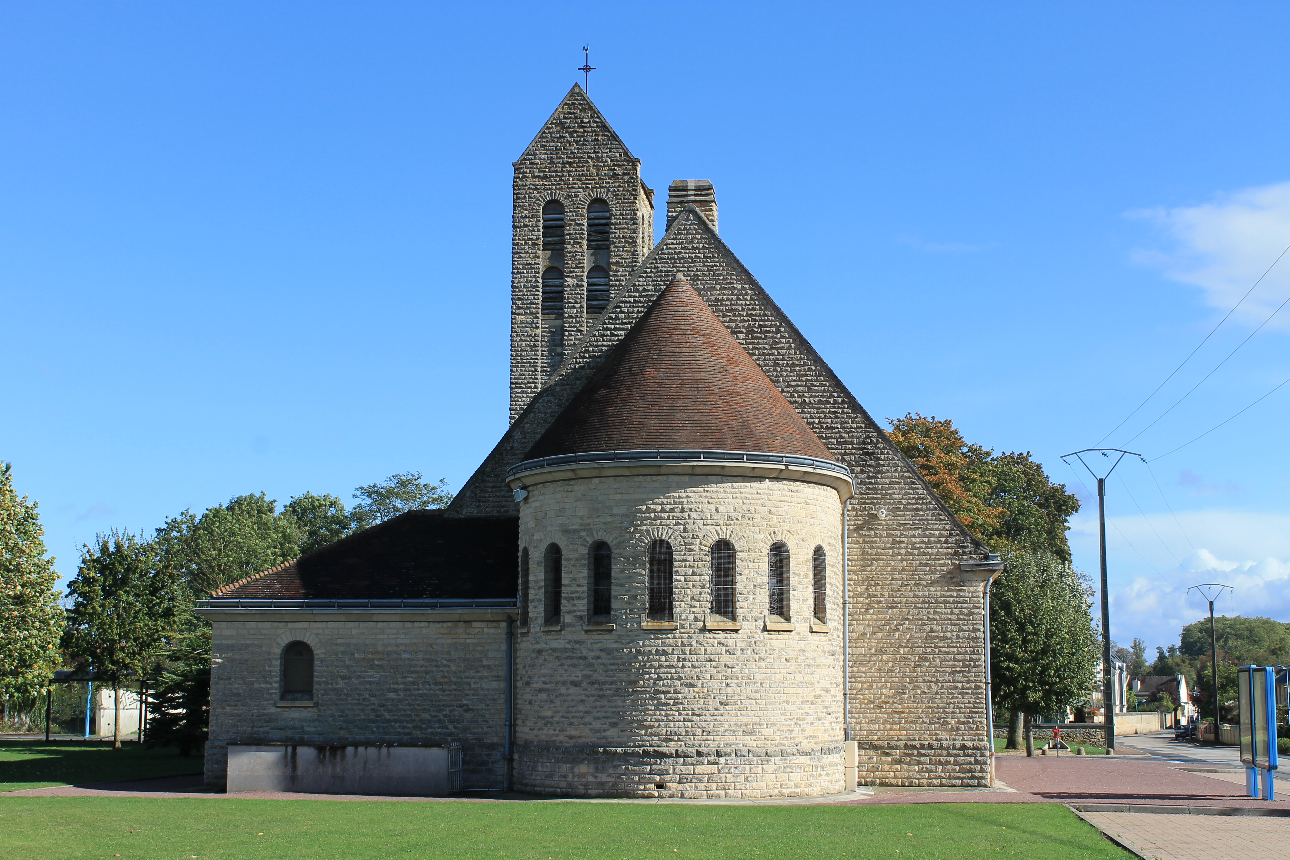 Eglise Notre-Dame à Bellengreville (Calvados)